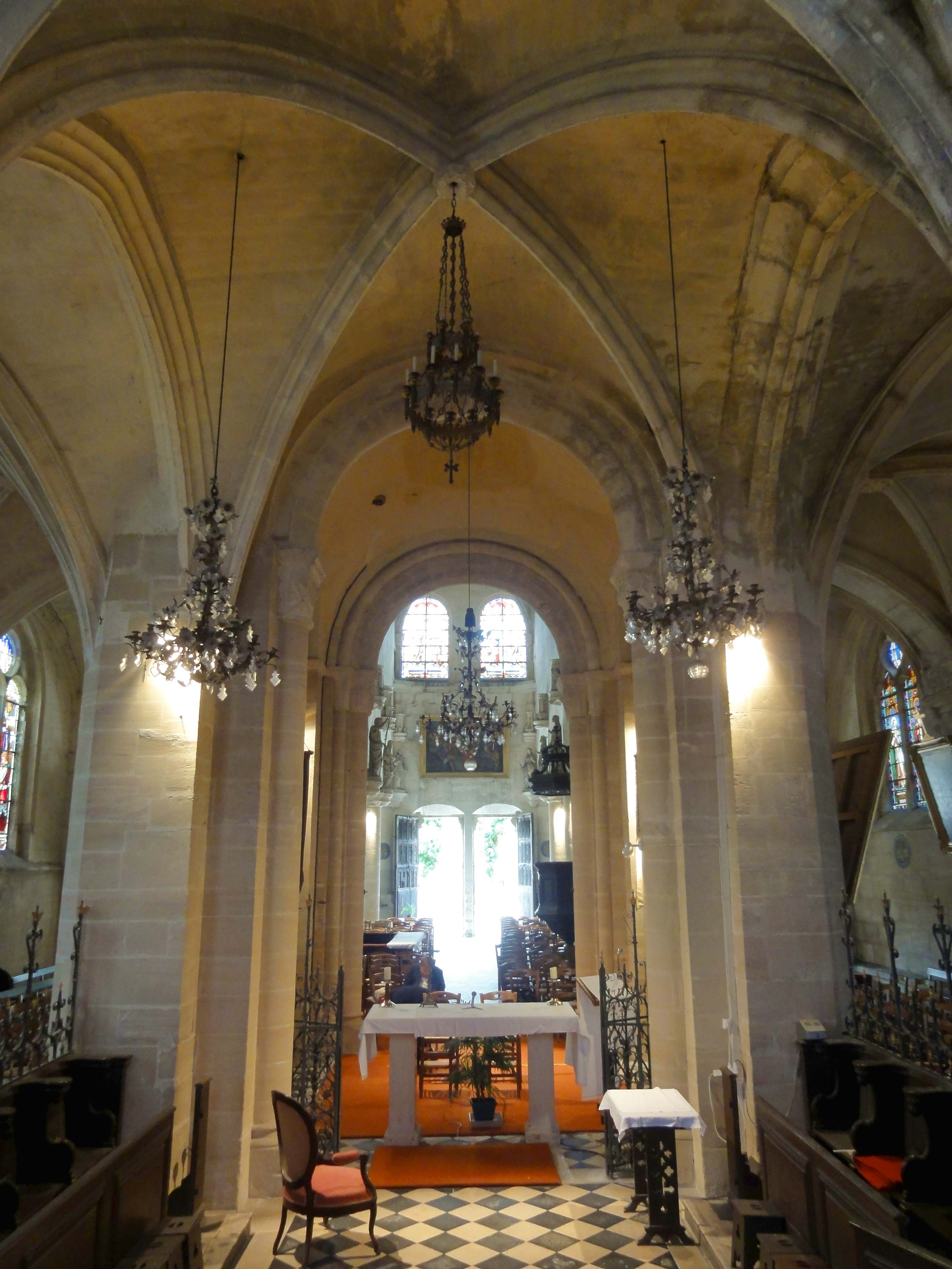 Intérieur de l'église (voir titre).